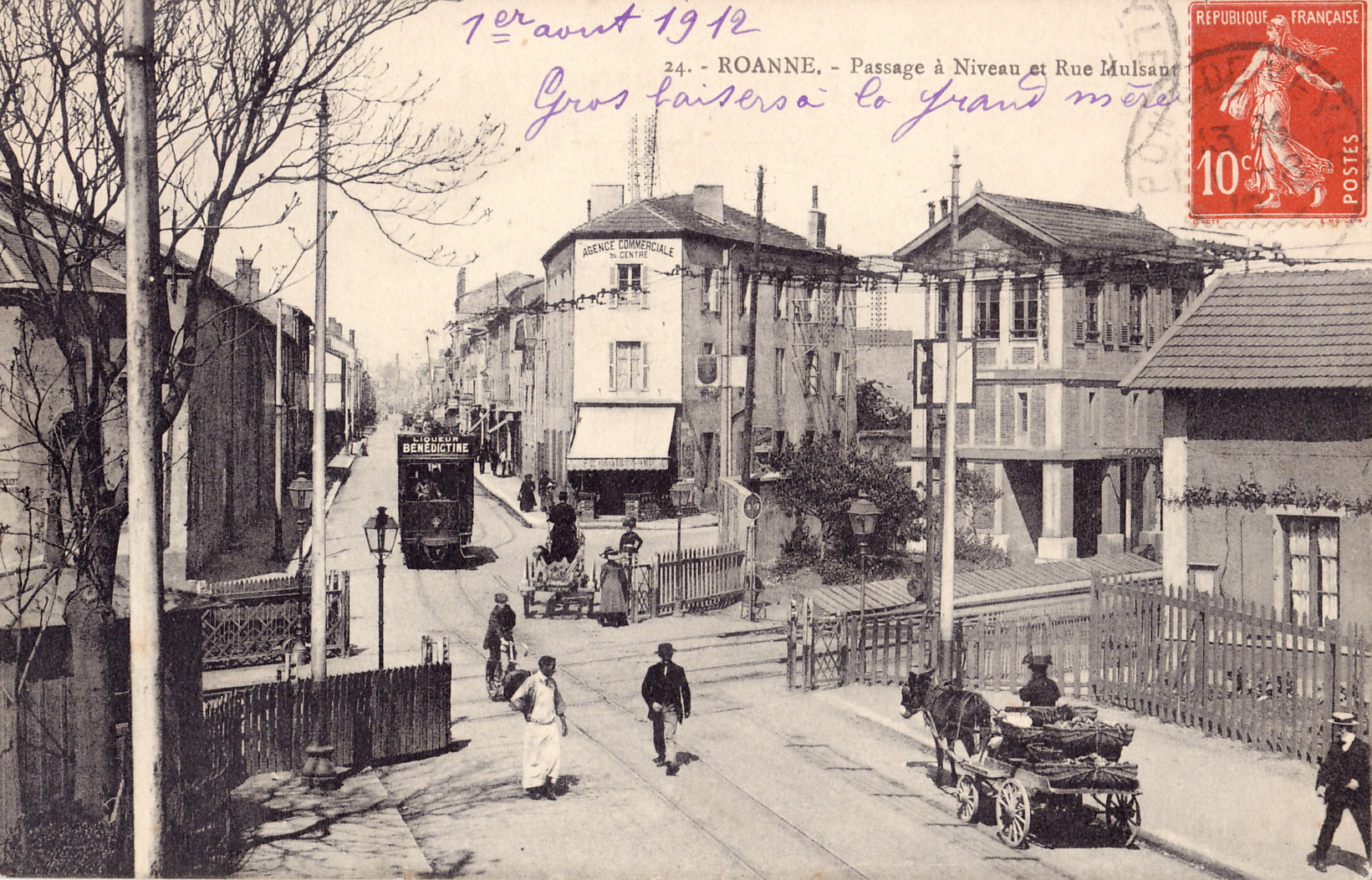 Carte postale ancienne sans mention d'éditeur, n°24 : ROANNE - Passage à niveau et rue Mulsant